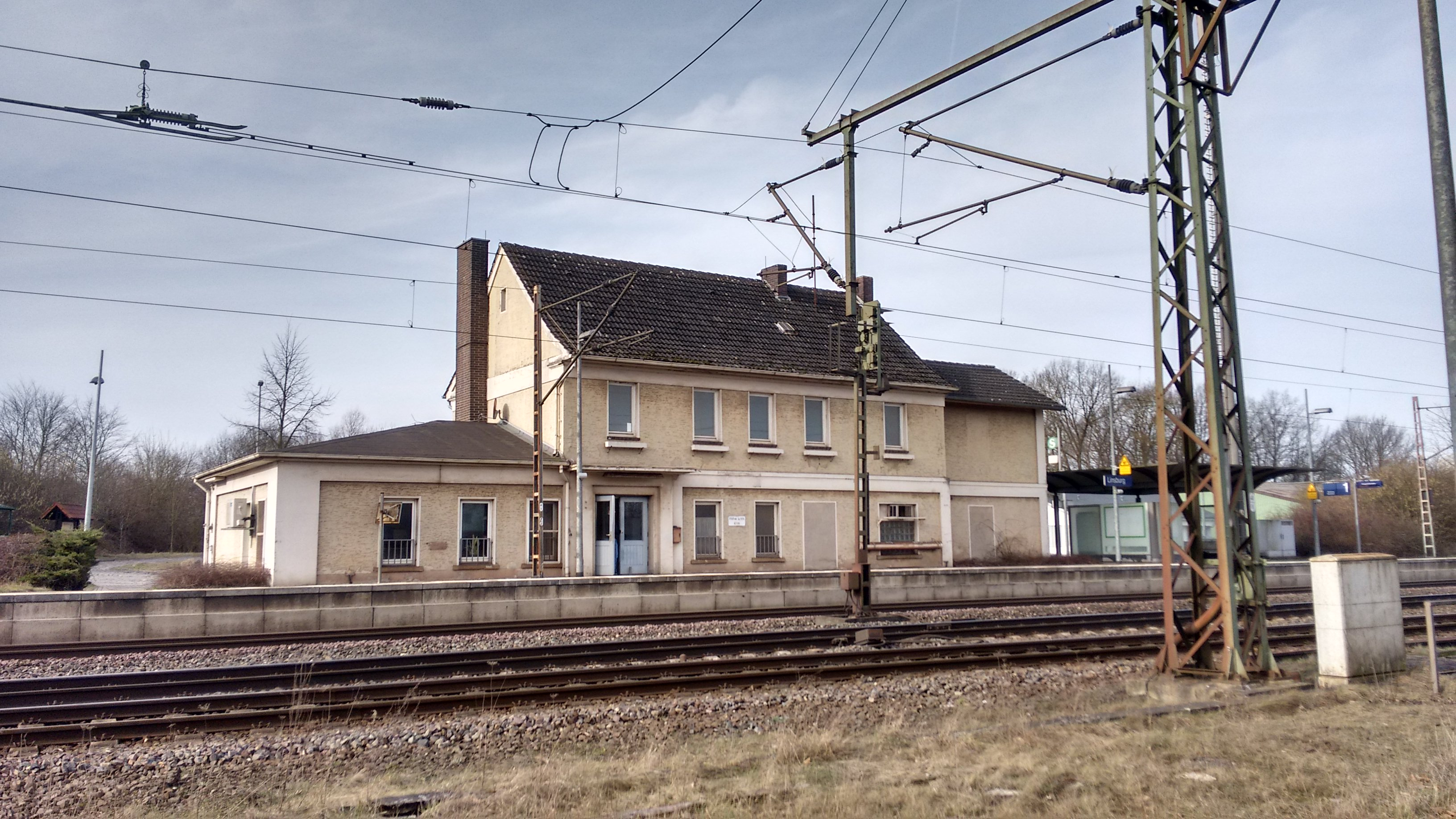 Bahnhof Linsburg der S-Bahn Hannover